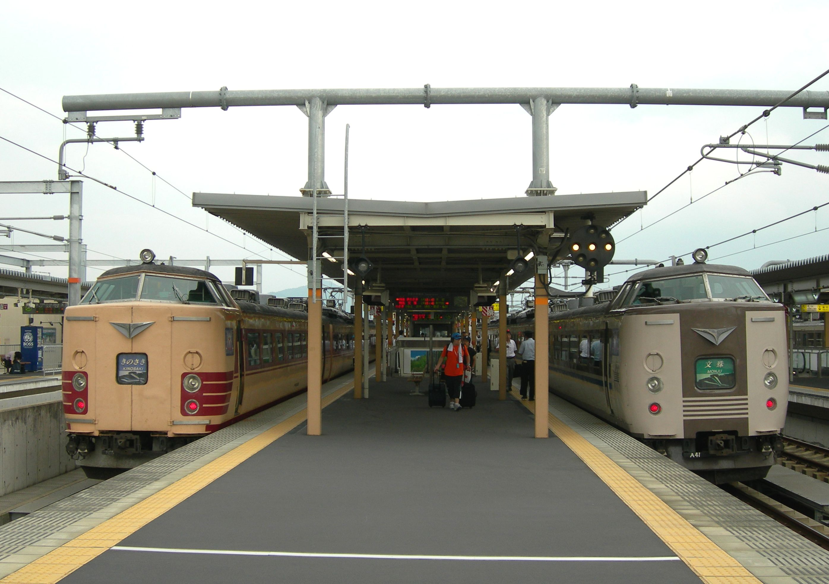 福知山駅ホーム停車中の特急きのさきと特急文殊